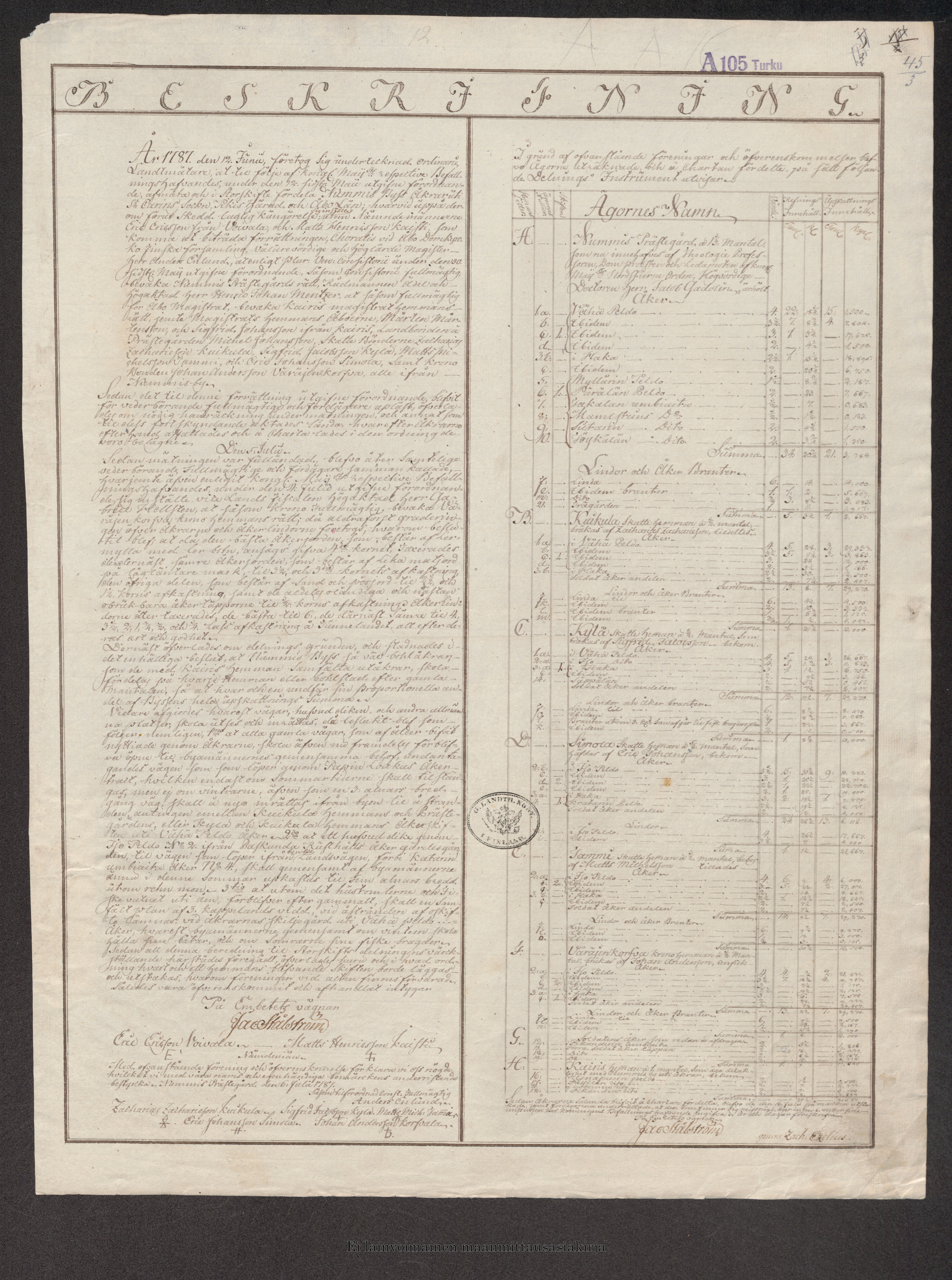 Ensimmäinen kirjallinen todiste Kuikkulan tilasta.